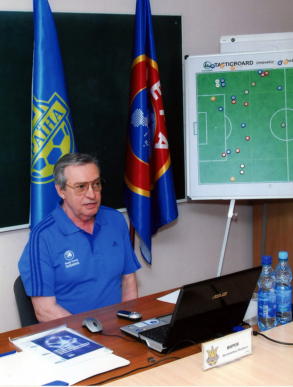 Константин Вихров во время лекции для слушателей Центра лицензирования ФФУ. Киев. 2004.